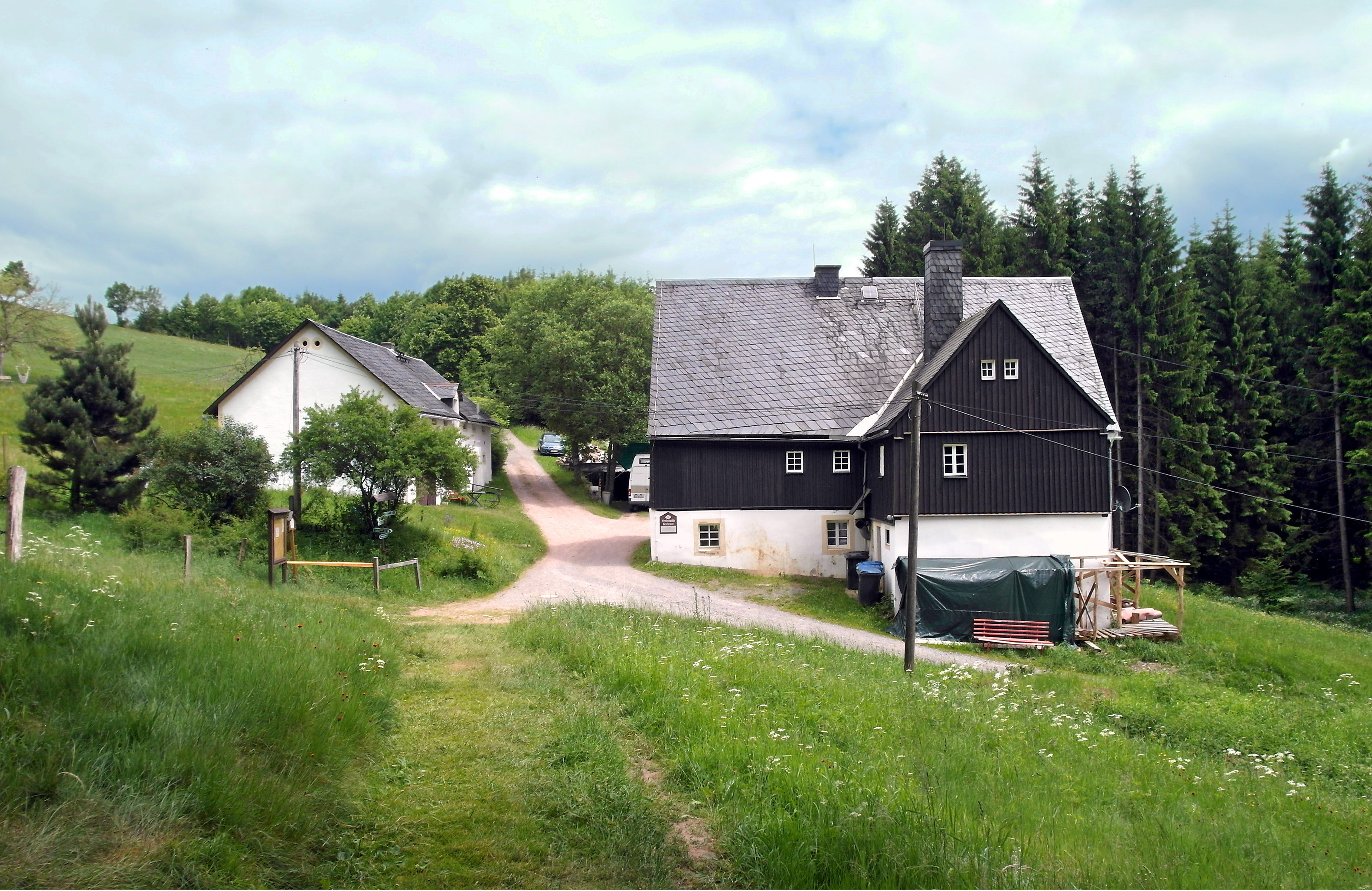 13.06.2017 01762 Reichenau (Hartmannsdorf-Reichenau), Gimmlitztal 42: Die Weicheltmühle (GMP: 50.774261,13.585342) wurde 1807 vom Reichenauer Bauern Friedrich Gotthelf Weichelt erbaut. Wassermühle, Getreidemühle, Knochenstampfmühle. Bewirtschaftet bis 1954. Ab 2016 wird die Mühle als Wandererherberge und Mühlencafé betrieben. Sicht von Westen. [SAM0293.JPG]20170613430DR.JPG(c)Blobelt